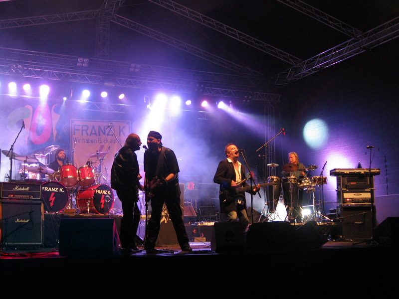 FRANZ K. Live in Bottrop